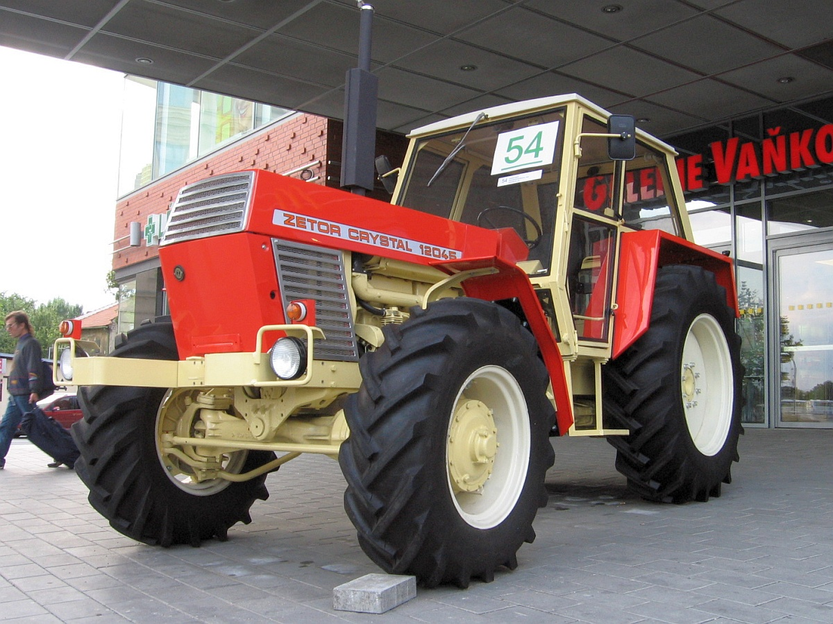 Česky: Zetor 12045